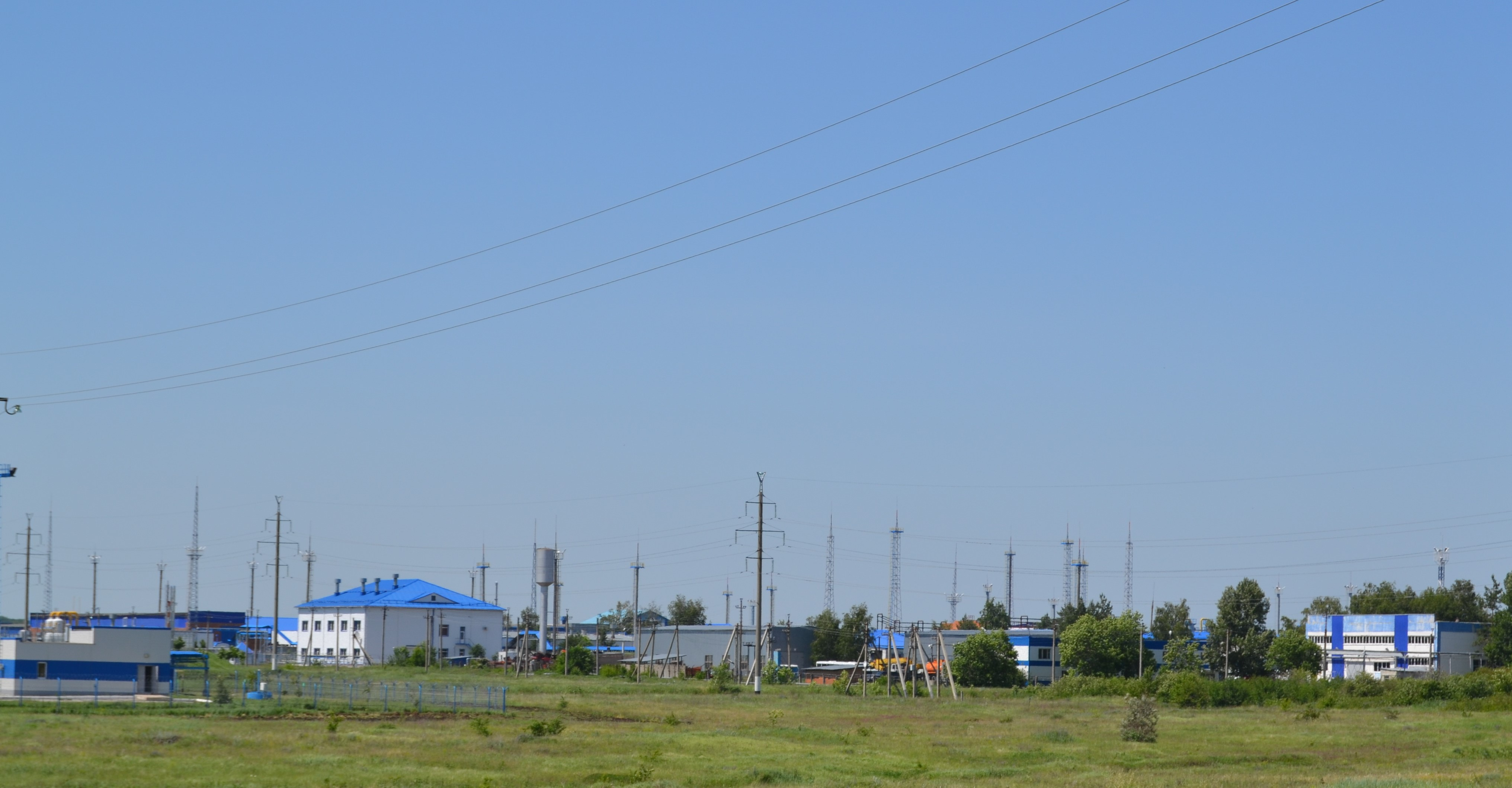 Изображение посёлка. Газокомпрессорная станция (Красный Октябрь, Саратовский район)